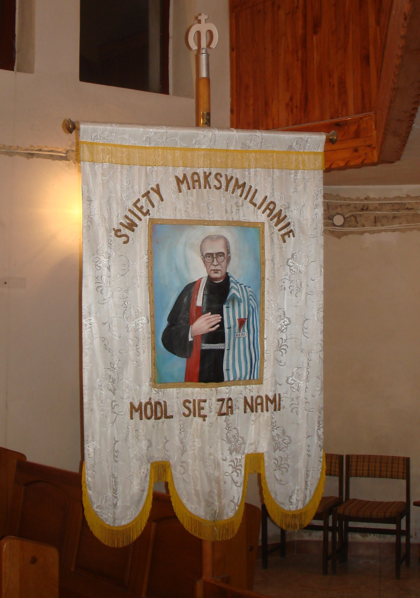 Sędzisław, kościół pw. św. Maksymiliana Kolbe